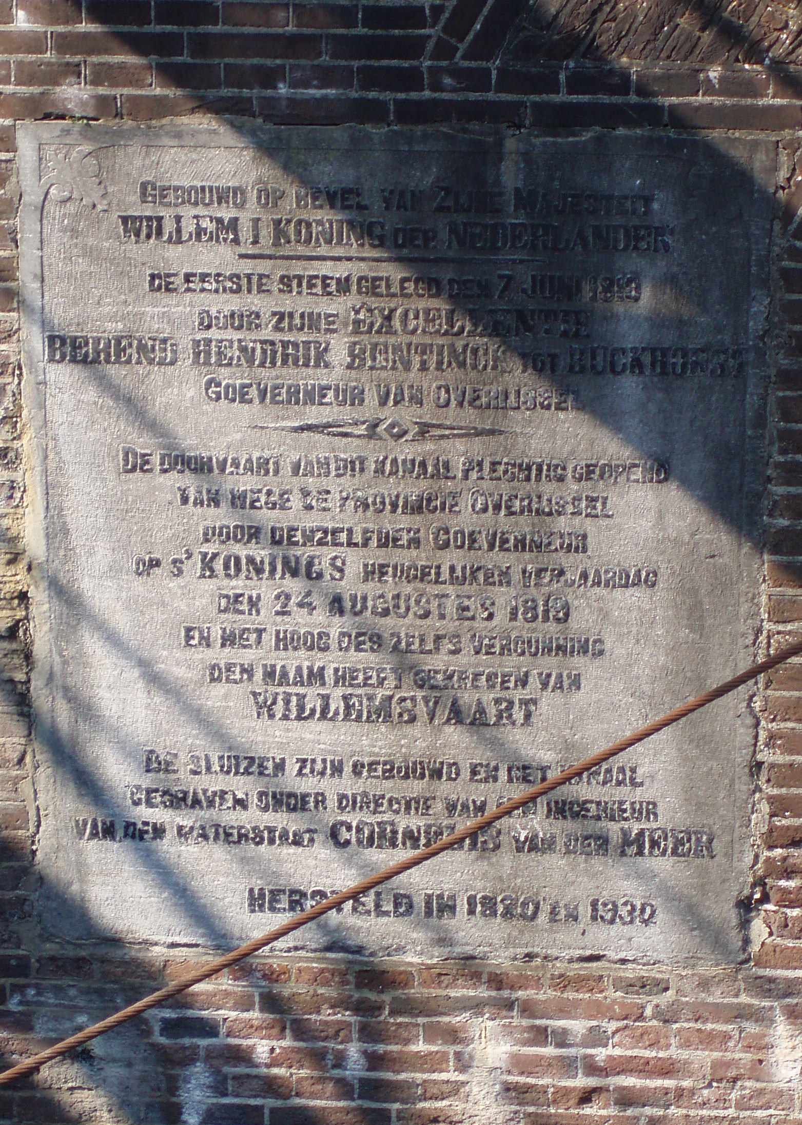 Plaquette ter herinnering aan de opening van de Willemsvaart op 24 augustus 1819 in Zwolle door Berend Hendrik Bentinck tot Buckhorst Deze bevindt zich op de sluis tussen de Ijssel en de Willemsvaart.